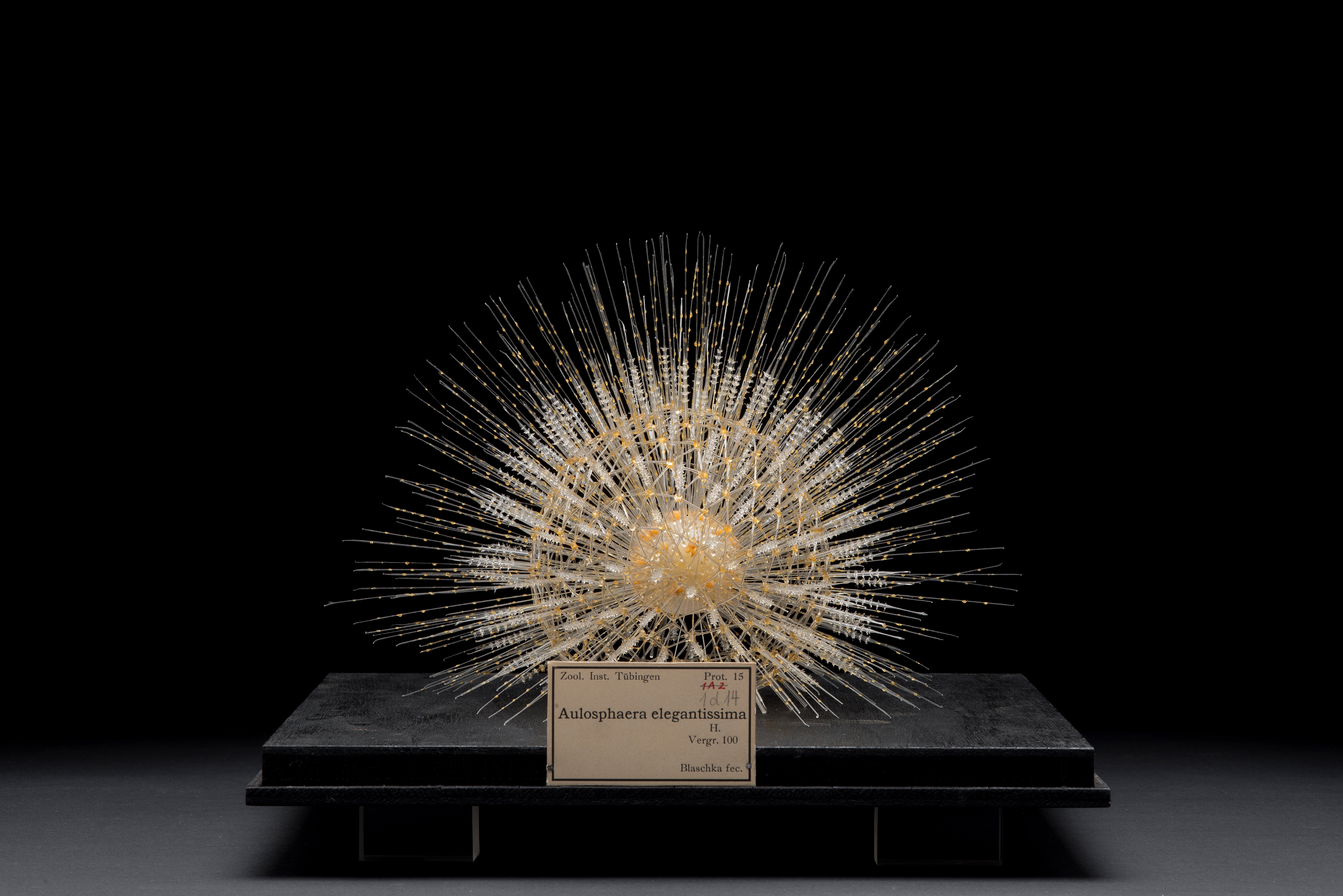 Radiolarium aus der Glasbläserwerkstatt Blaschka, Zoologische Sammlung der Universität Tübingen